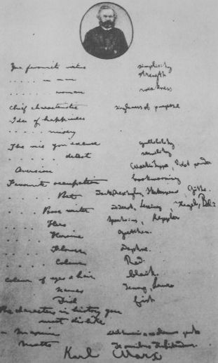 Karl Marx Eintrag in das Poesiealbum von Jenny Marx